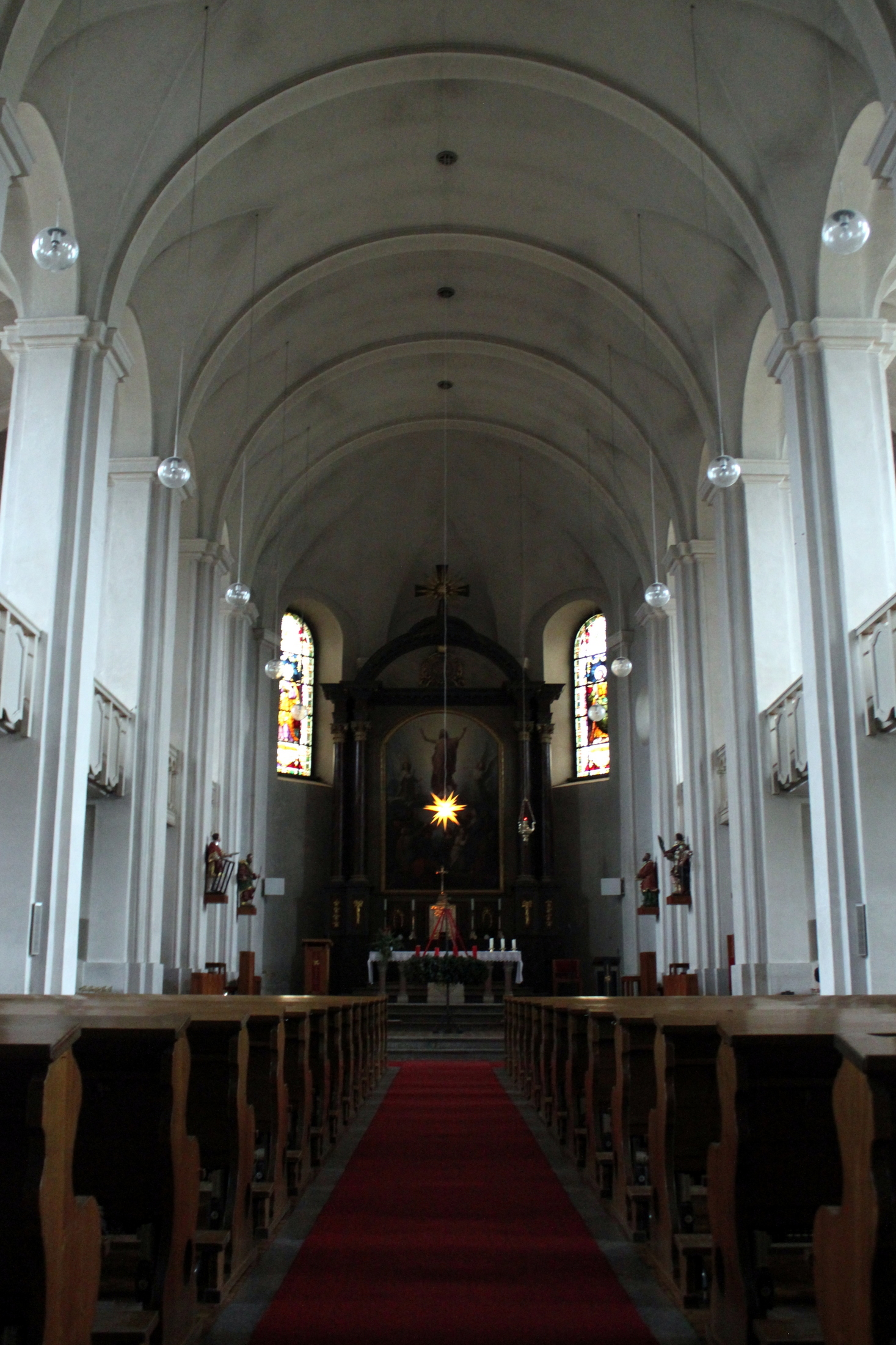 Hornjoserbsce: Chrósćicy; w katolskej cyrkwi.